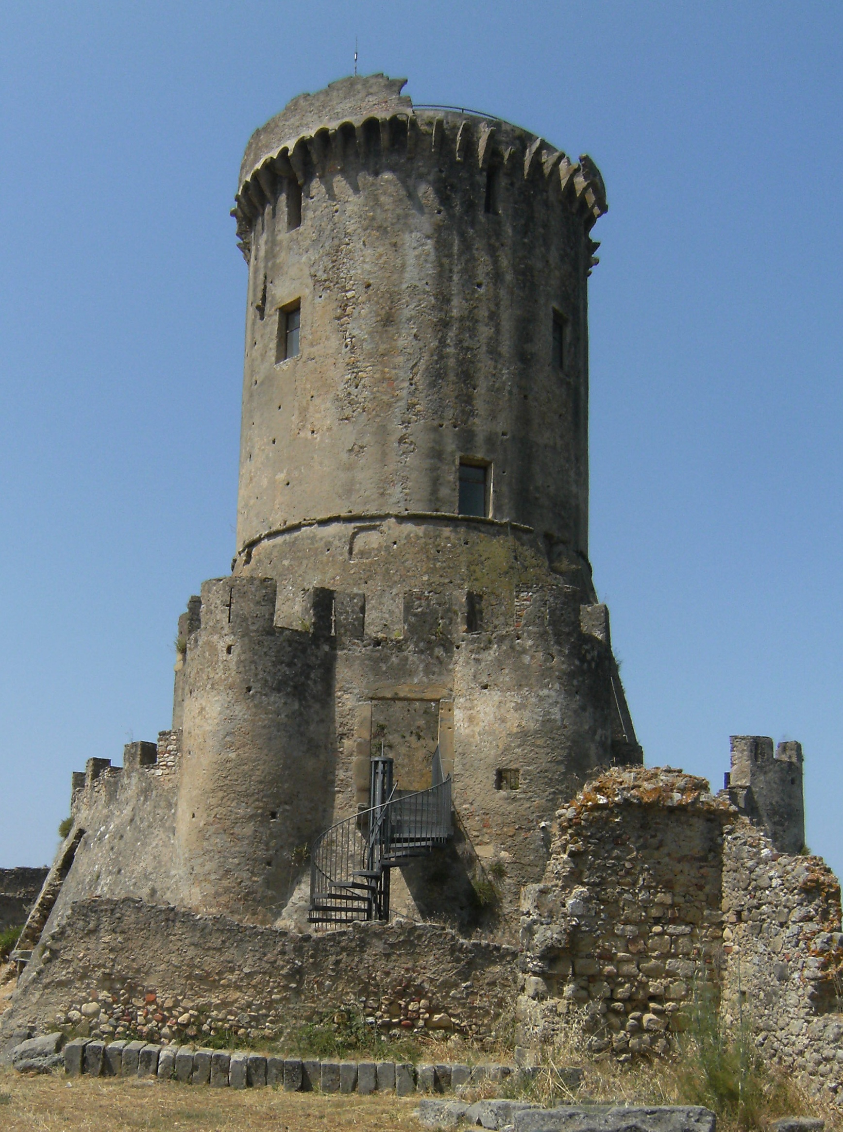 Scavi archeologici di Velia Elea